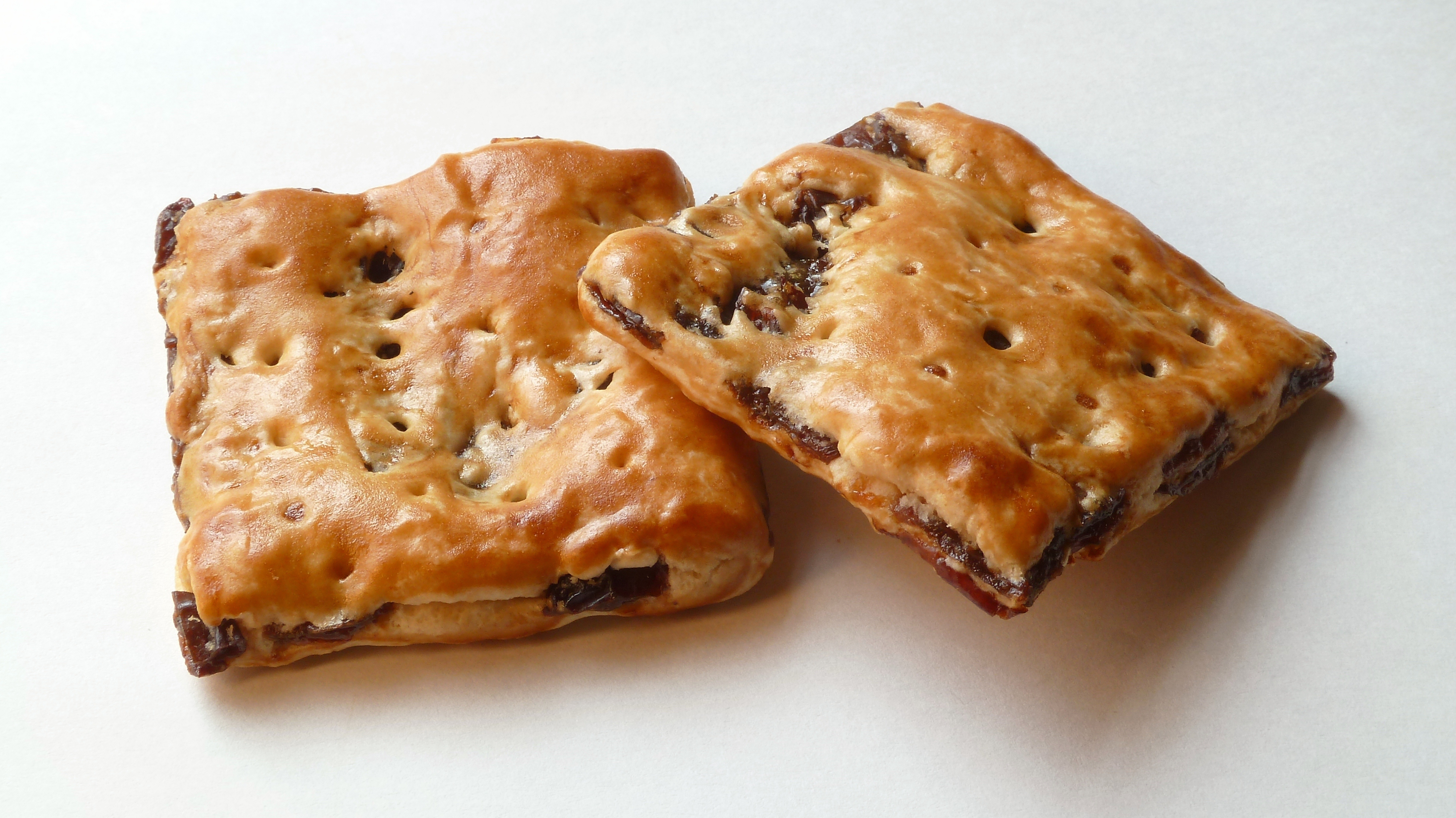 東ハトが販売するクッキー「オールレーズン」